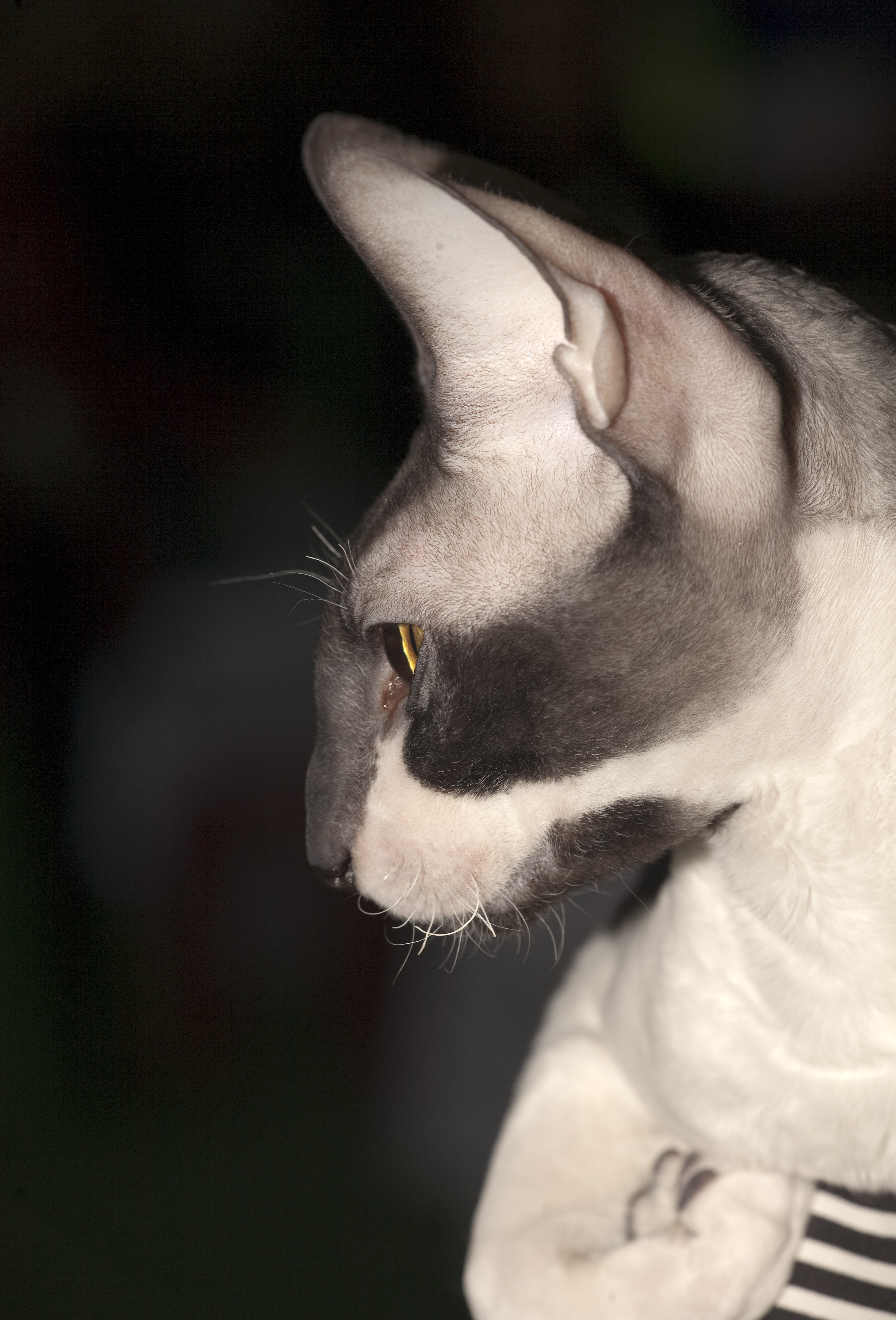 Корниш-рекс Selena Light's Ultimate Best, №432 по каталогу «Гран При Royal Canin-2010» (ICU). Кот. Окрас: чёрный биколор (СRX n 03). Дата рождения: 17/03/2009. Владелец: И.Агасафьянц. Город, клуб не указаны